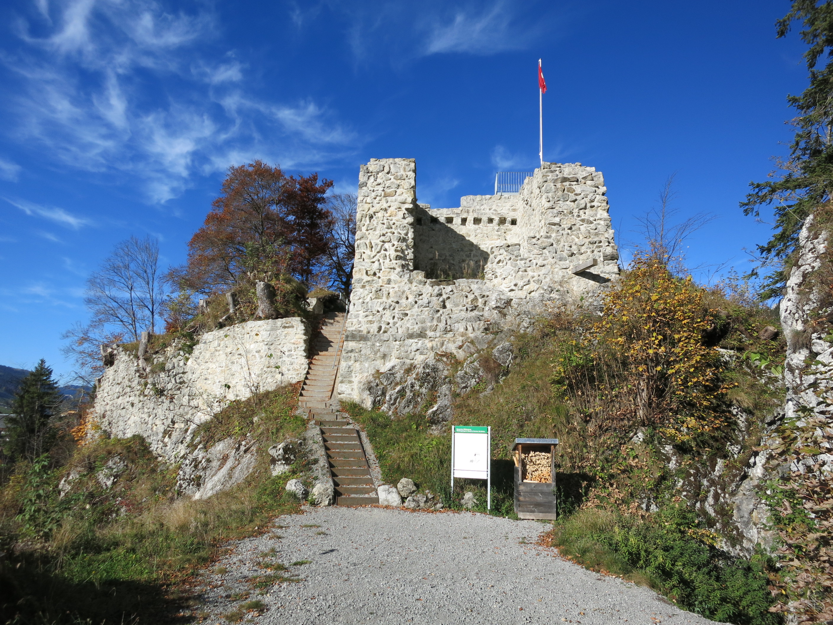 Burgruine Wildenburg, Wildhaus SG, Schweiz